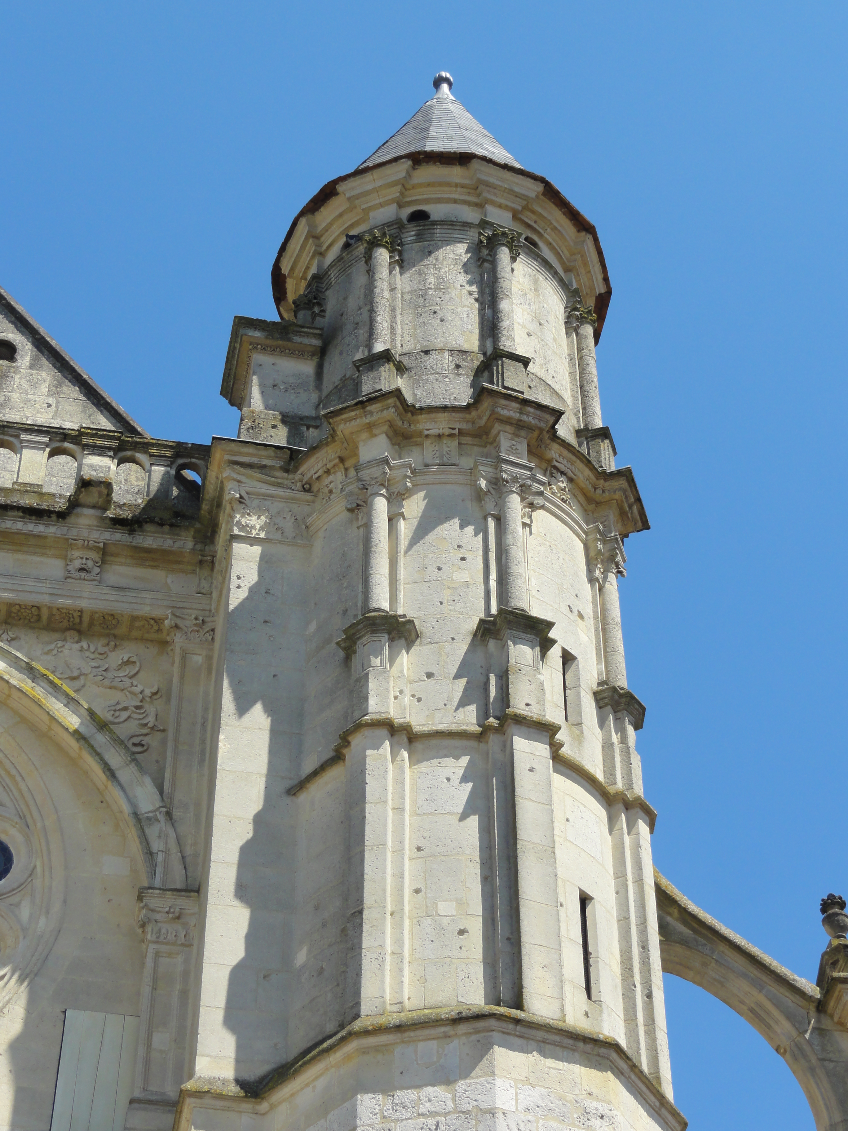 Façade occidentale, tourelle à l'angle sud-ouest.